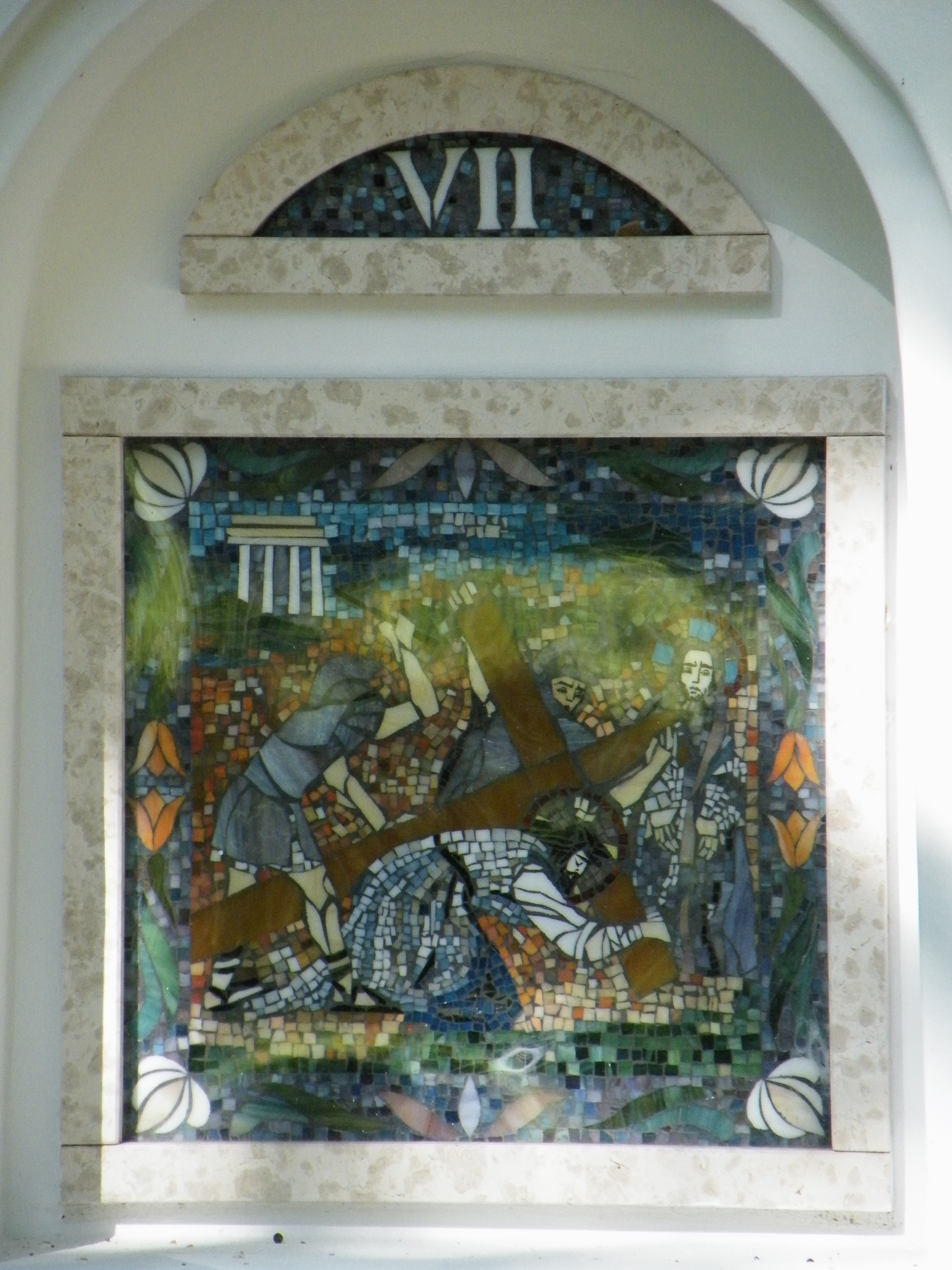 Stációk a Palóc ligetben, Balassagyarmaton